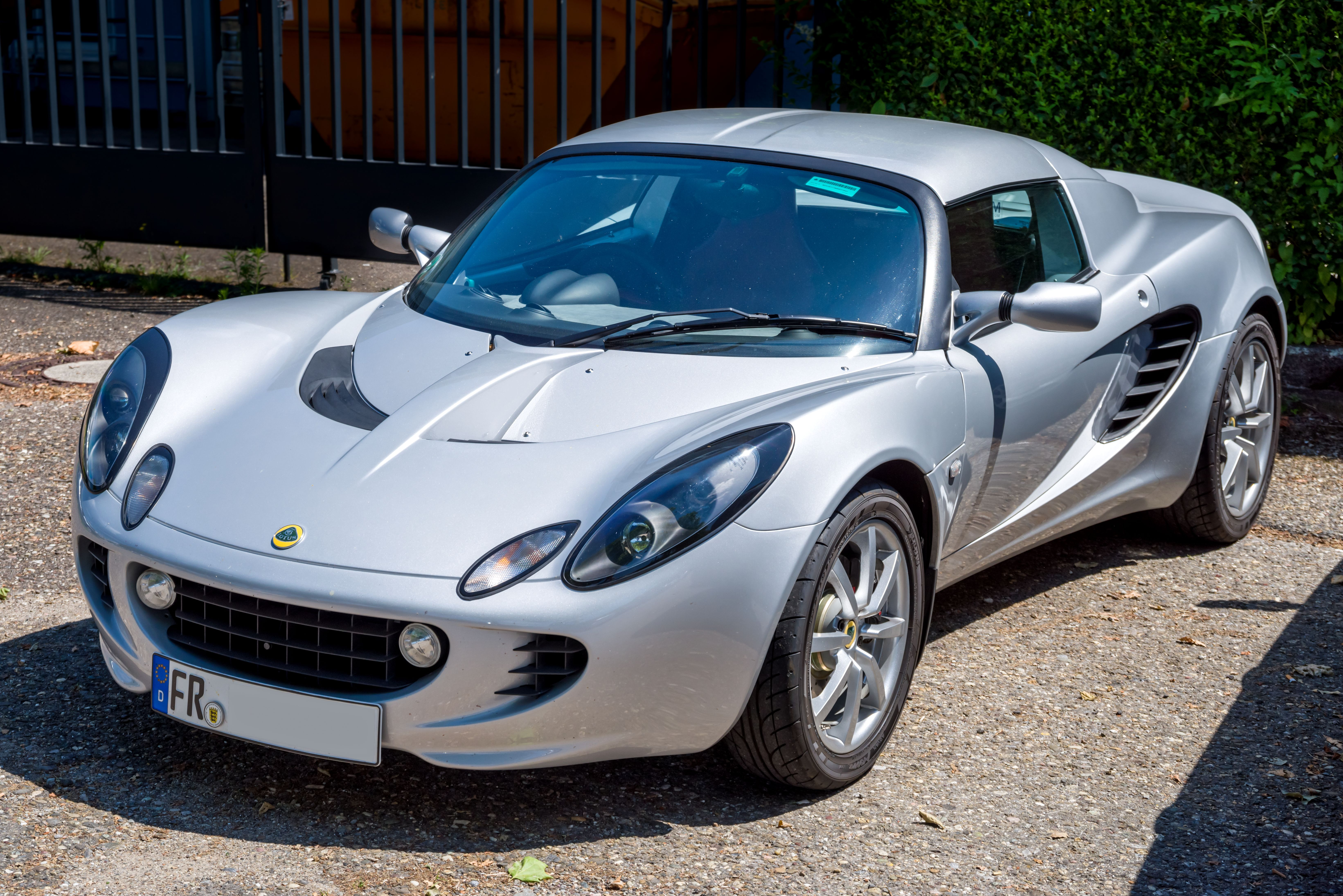 Bilder aus Freiburg